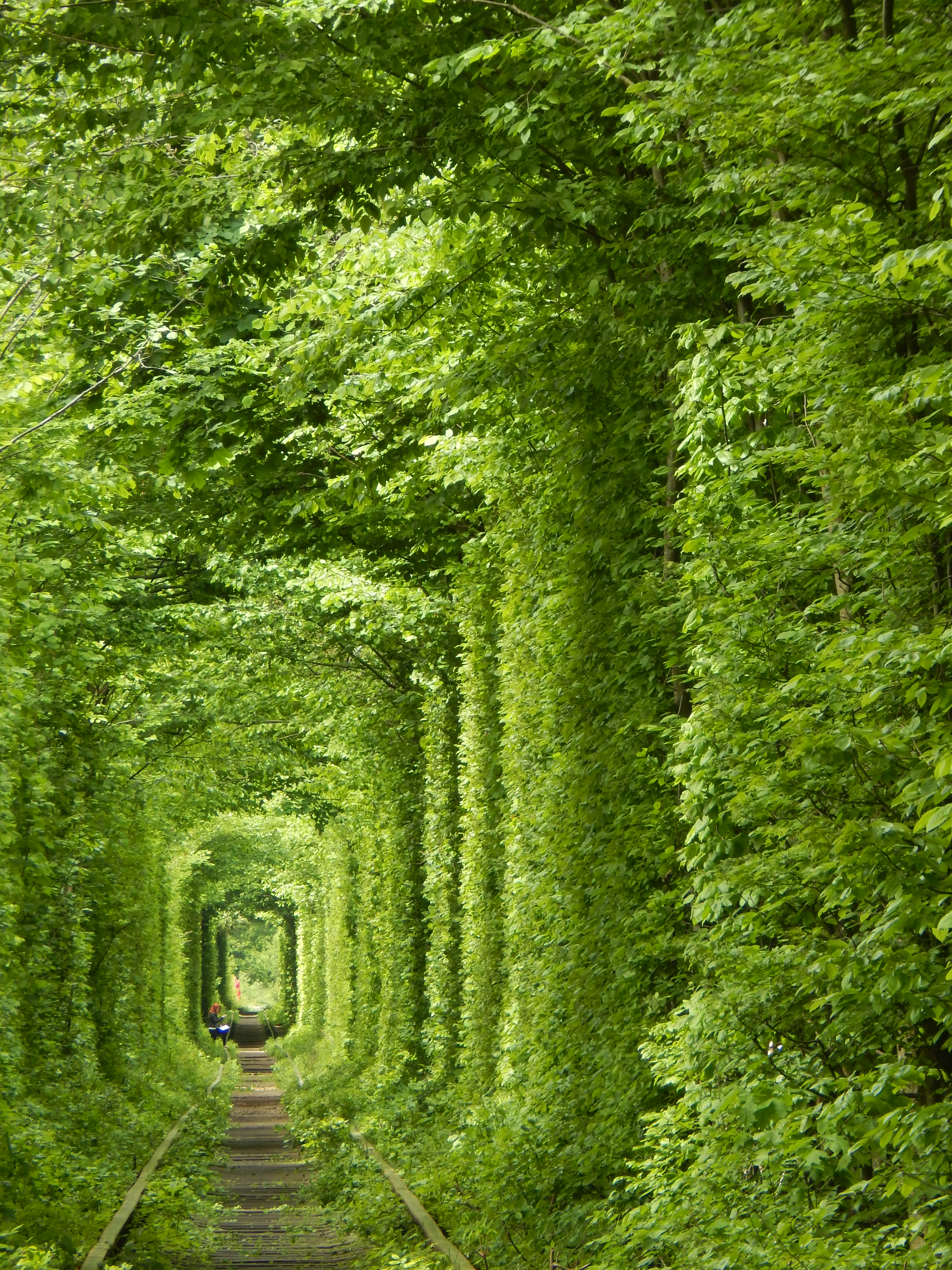 «Тунель кохання», Рівненський район